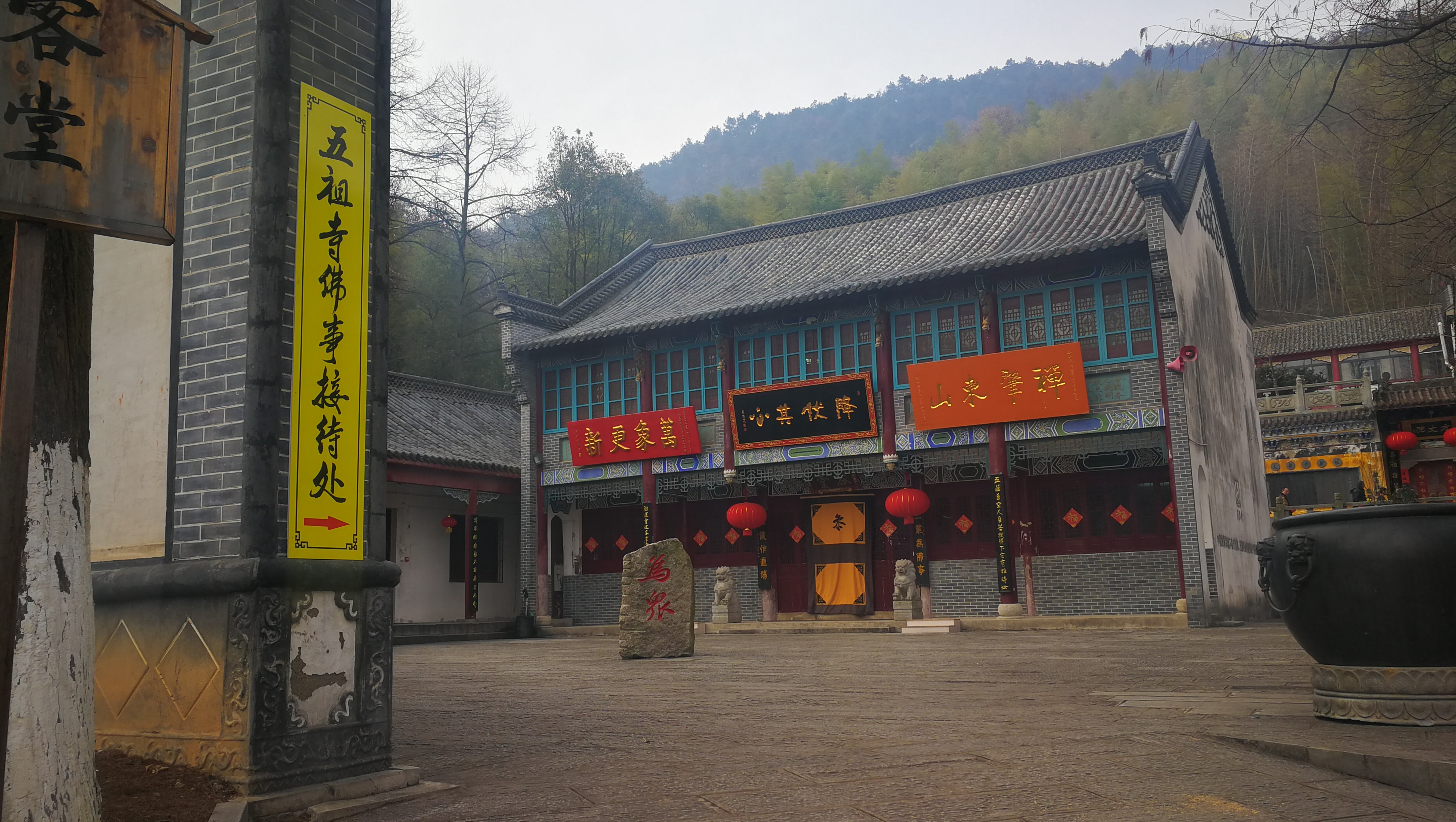 中文（中国大陆）: 五祖寺佛事接待处